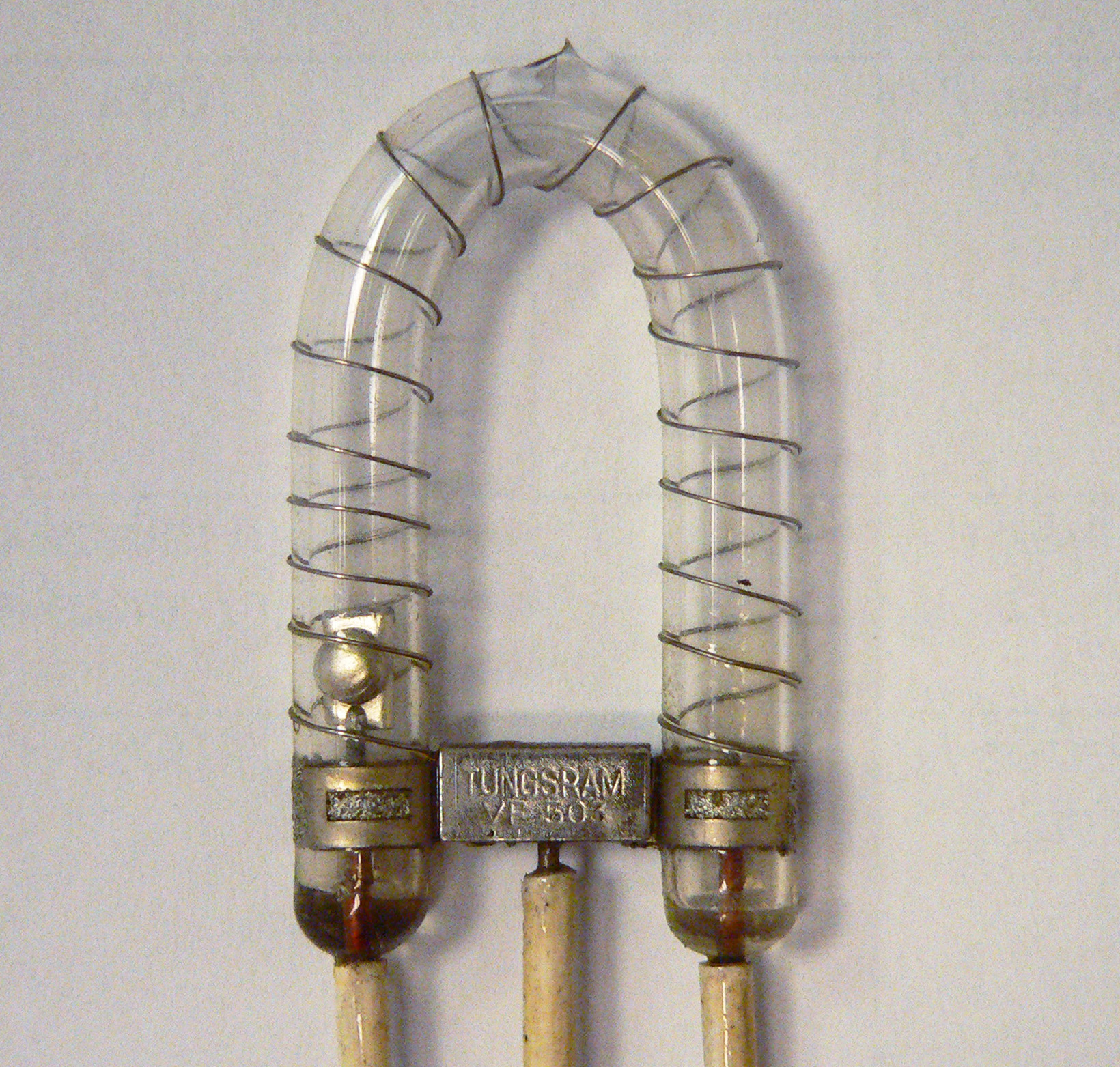 Xenon villanólámpa (tetején az ún. szívócső letörve látható)